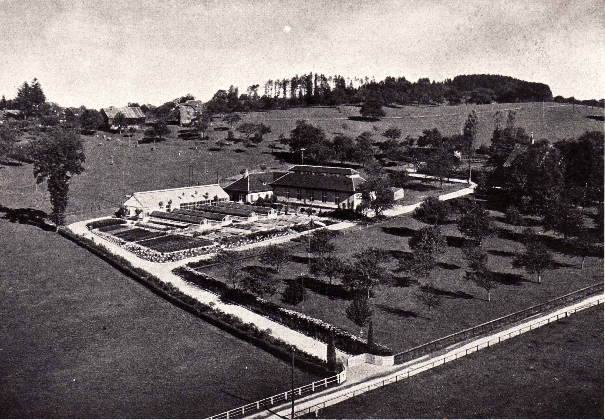 Neudorf, Botanischer Garten, Stadtgärtnerei. Blick vom Turm der Kirche St.Maria Neudorf gegen Norden